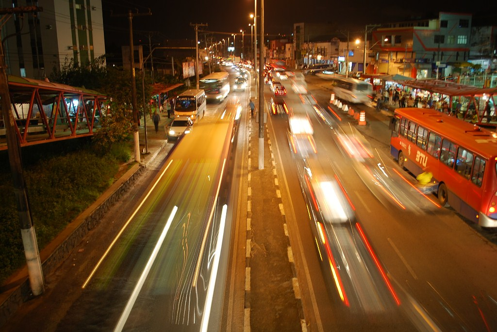 A velocidade dos veículos reflete o crescimento de uma cidade que neste mês completa 47 anos de emancipação política, mas soma 401 anos de história.